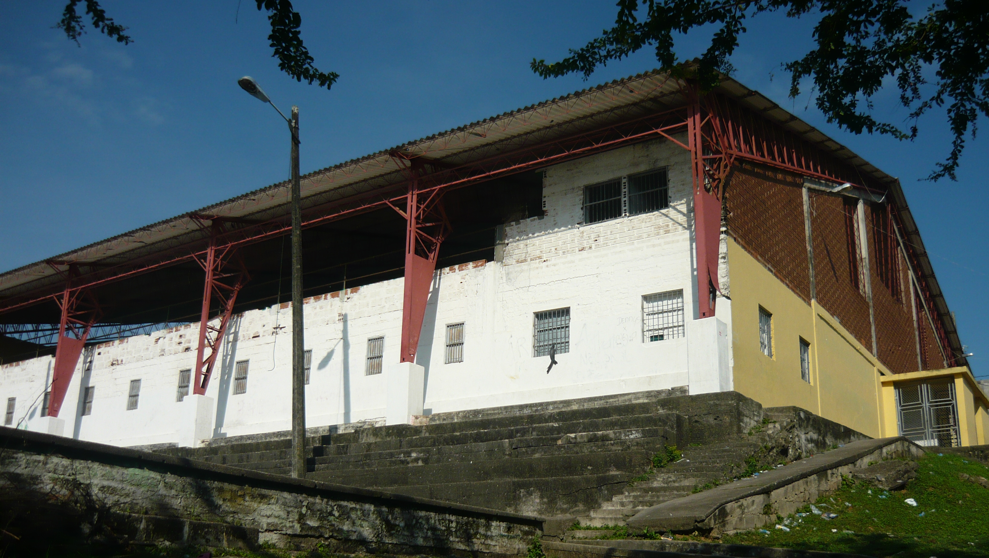 Coliseo cubierto Antonio Roldan Betancur en el Municipio de Puerto Berrio - Antioquia